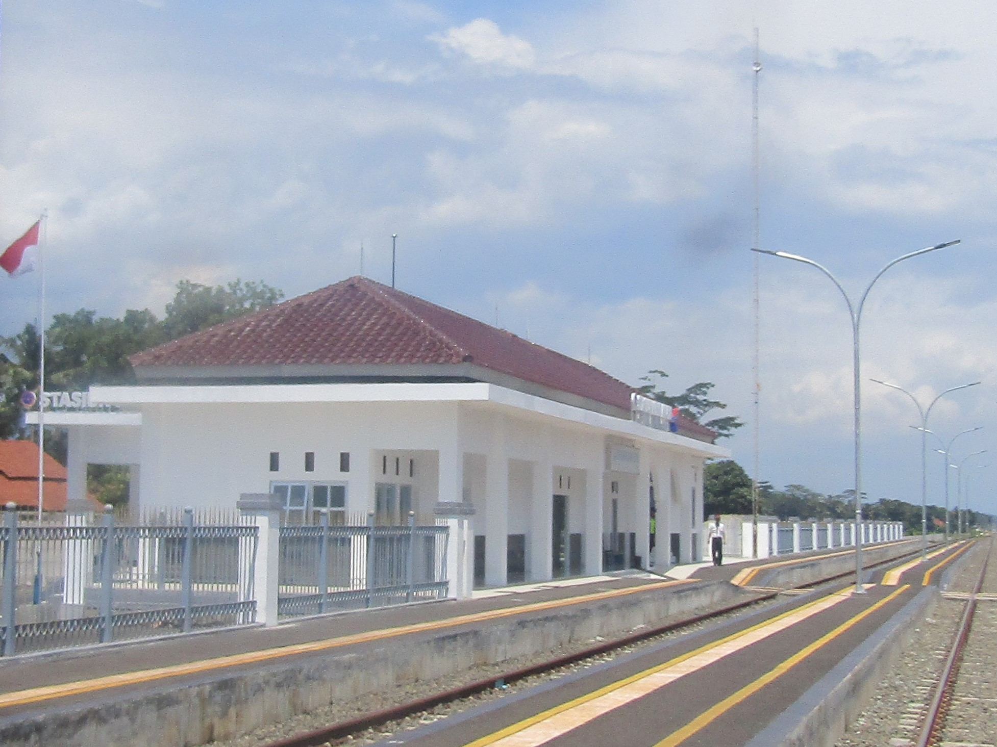 Stasiun Kemranjen, 2020